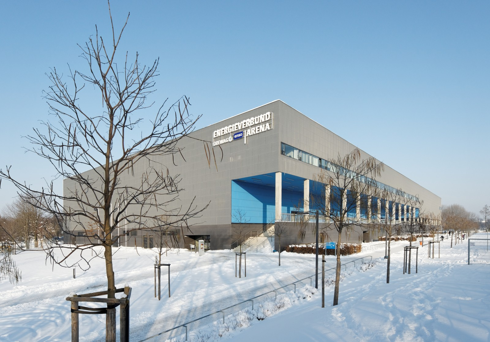 Die EnergieVerbund Arena in winterlicher Kulisse